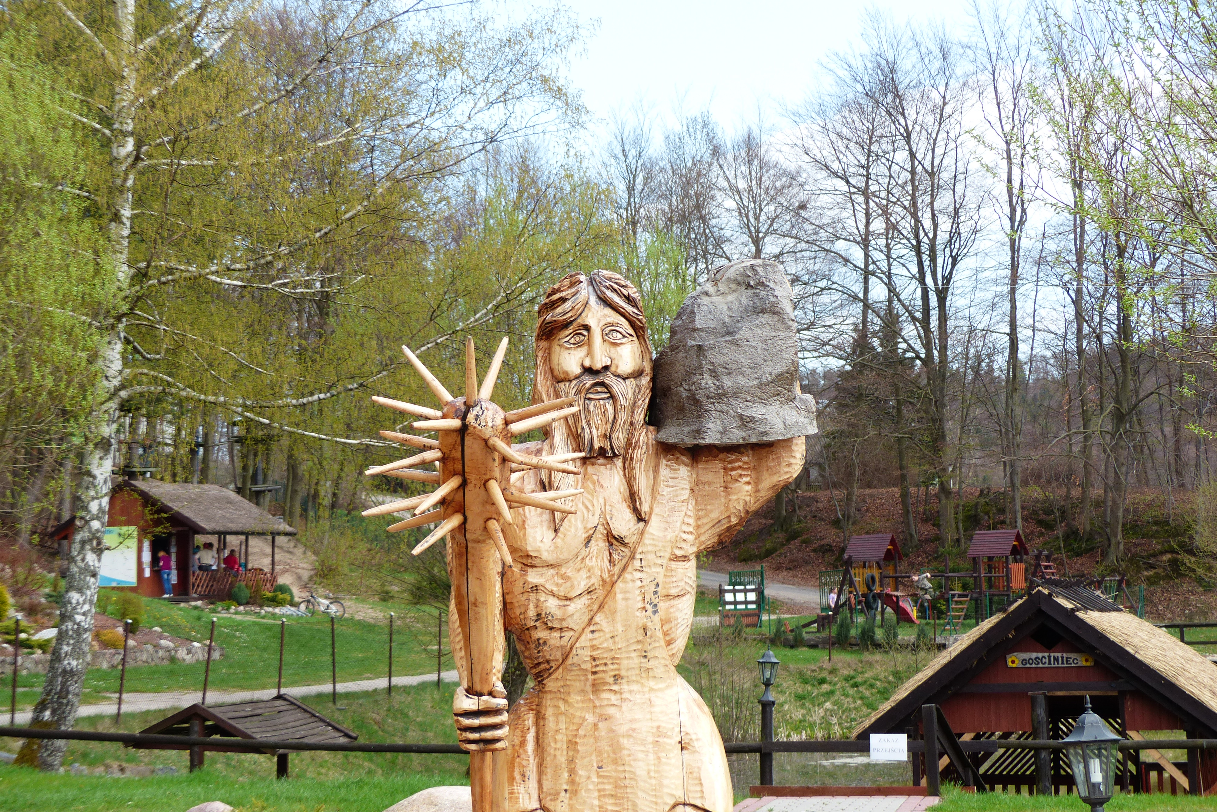 Ostrzyce Węgloszyno - Zajazd "U Stolema"